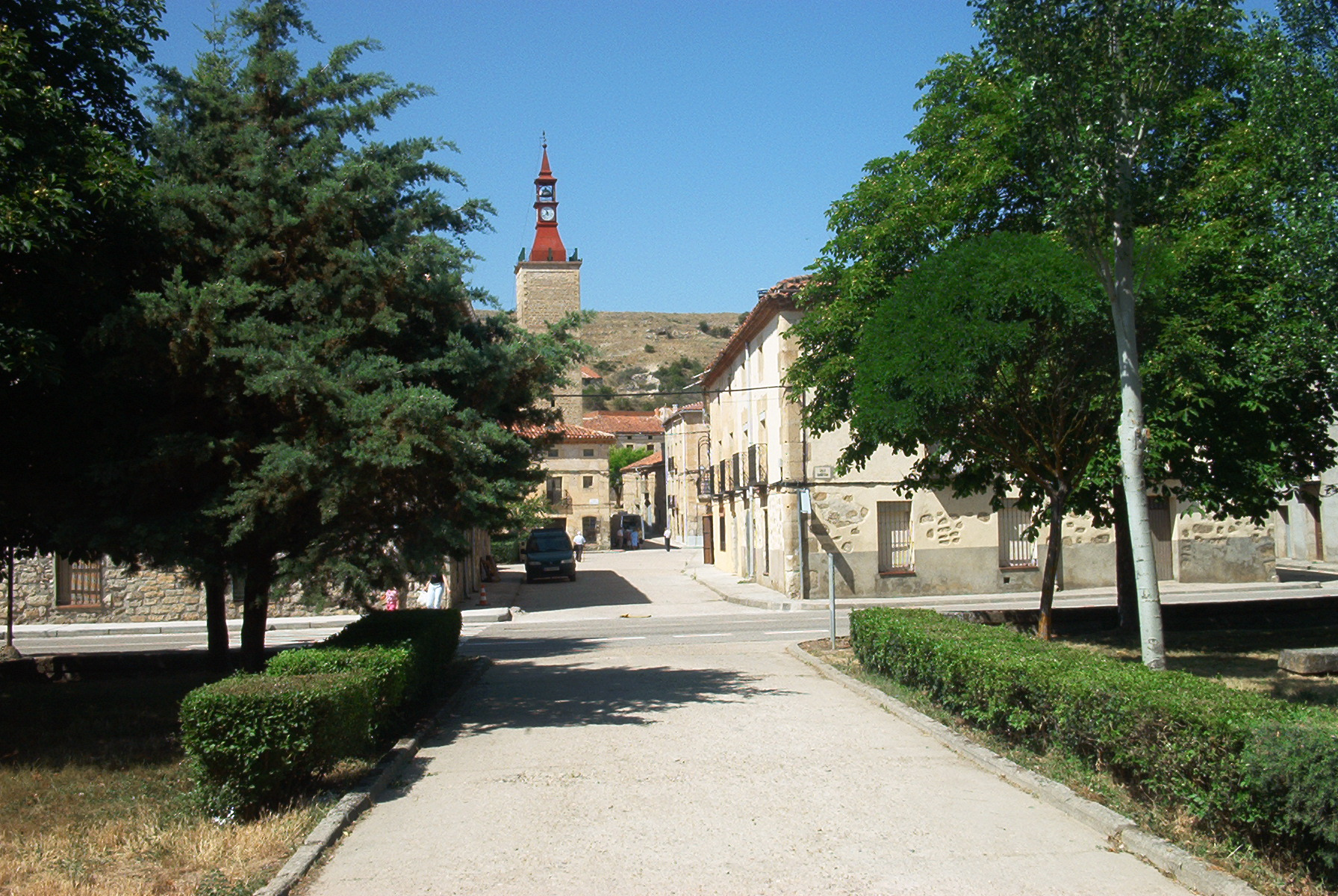 mARANCHÓN